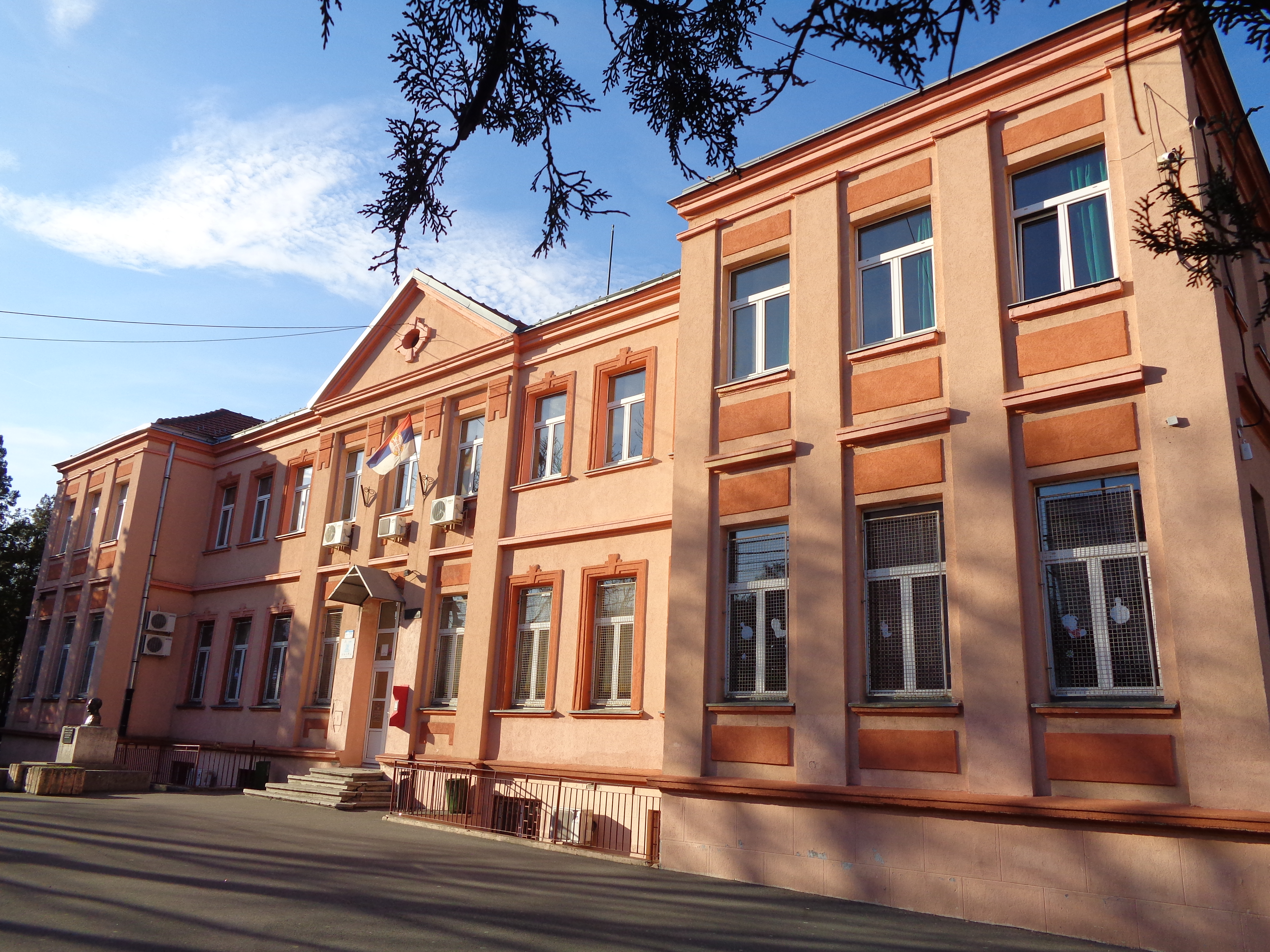 Зграда основне школе у Вишњици